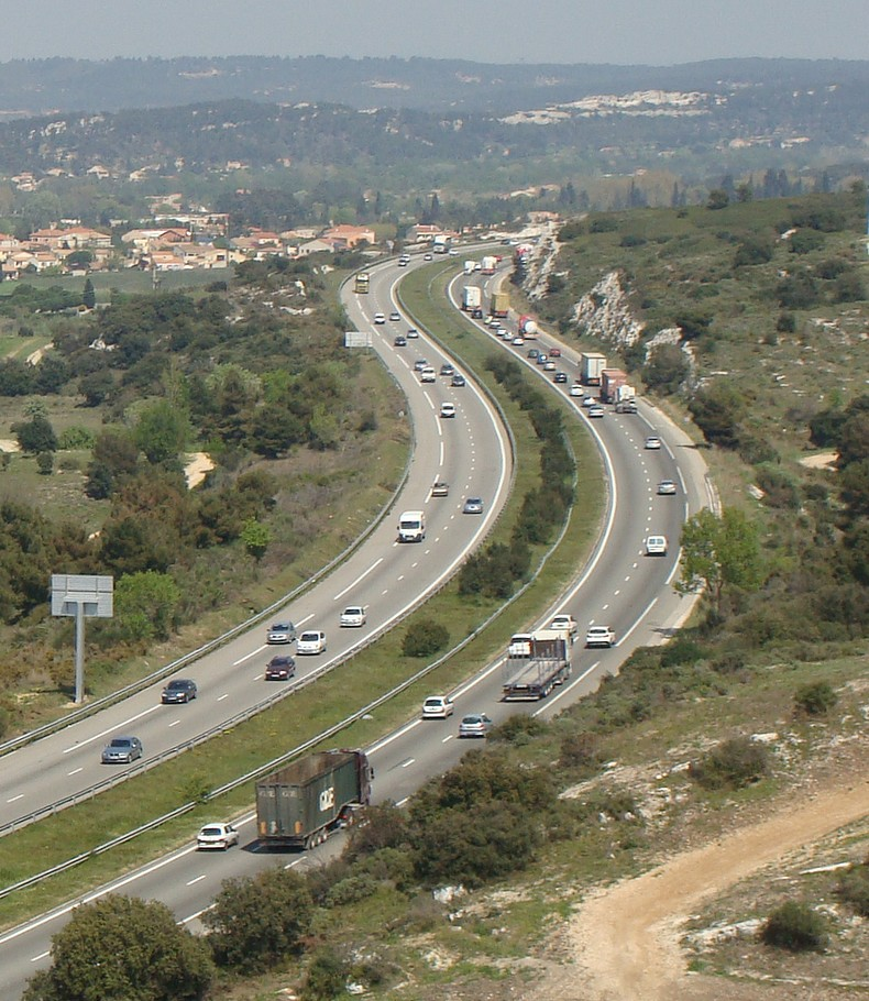 L'autoroute A55 vu de la chapelle Saint-Michel de Gignac (photo prise en direction de Marseille).